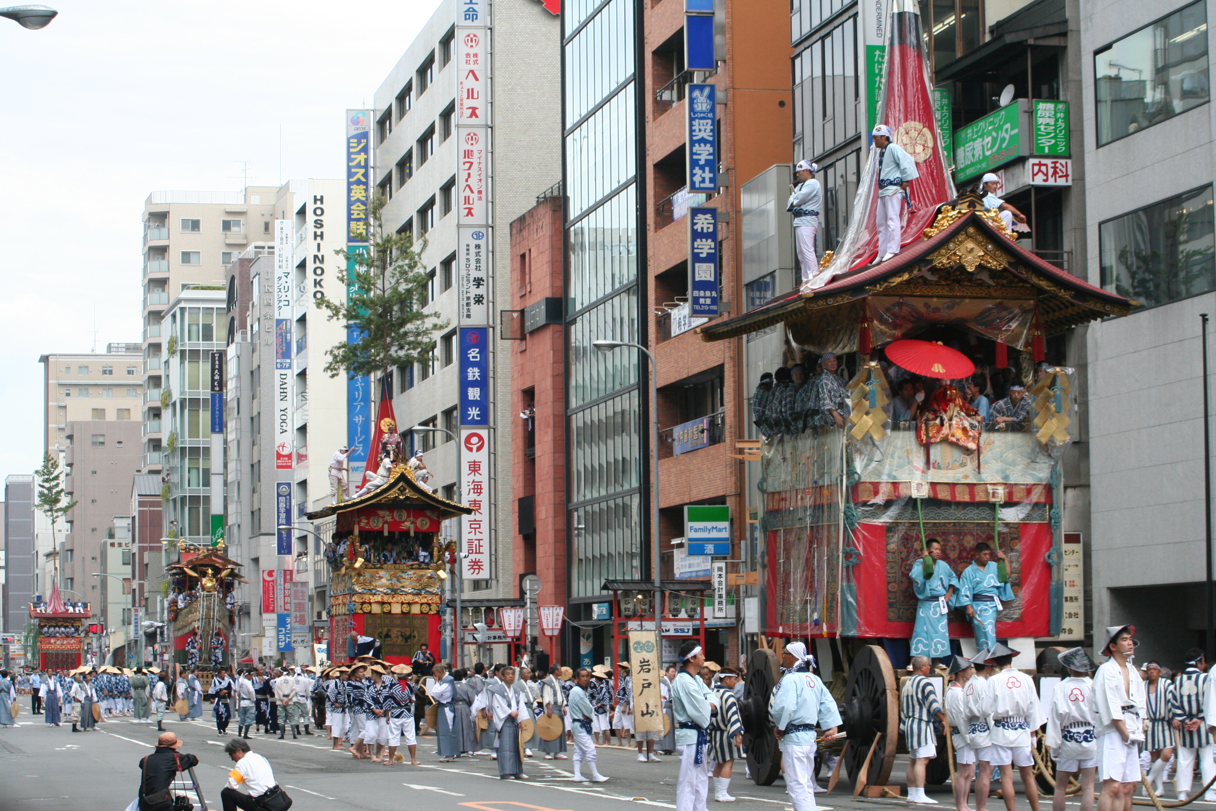 2009年7月17日に京都市で行なわれた祇園祭山鉾巡行の様子。 四条烏丸交差点西側に並ぶ山鉾。右手前から放下鉾、岩と山、船鉾、南観音山。